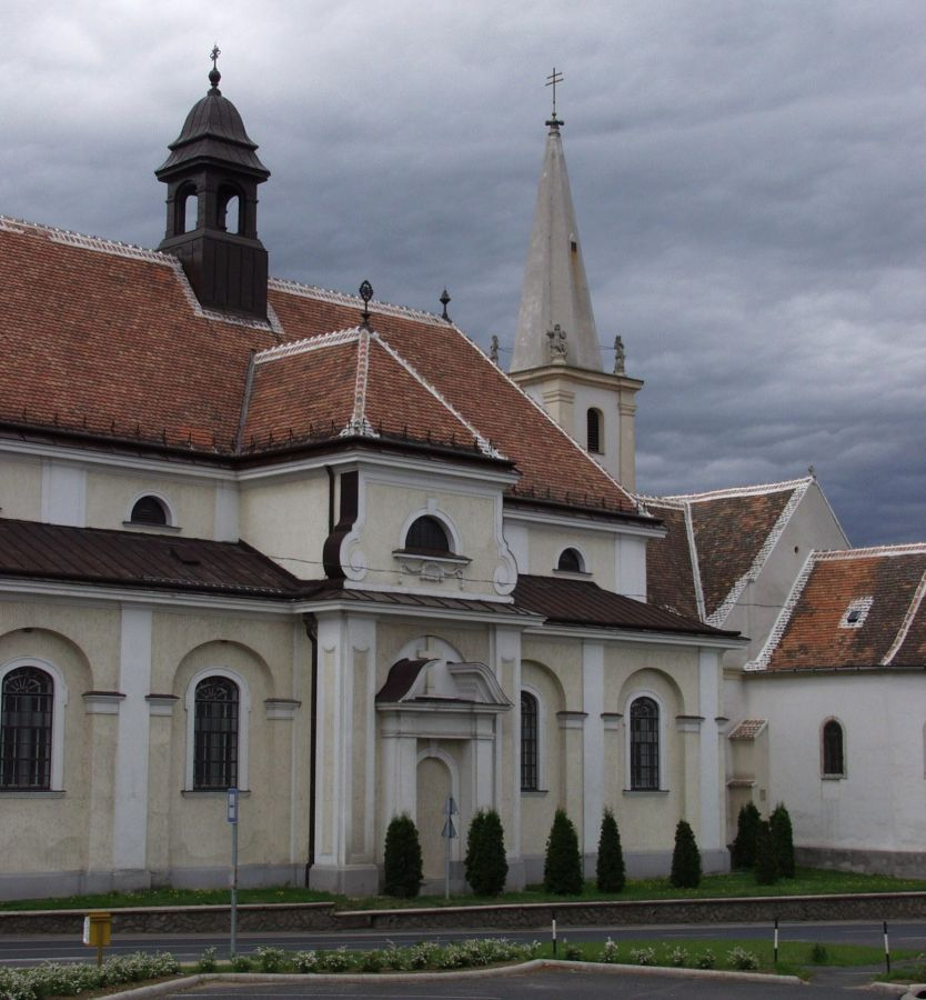 Szent Miklós Katolikus templom (középkori eredetű, barokk, 1725) azonosító: 4126, törzsszám: 3635 - Fertőszentmiklóson, Győr-Moson-Sopron megye